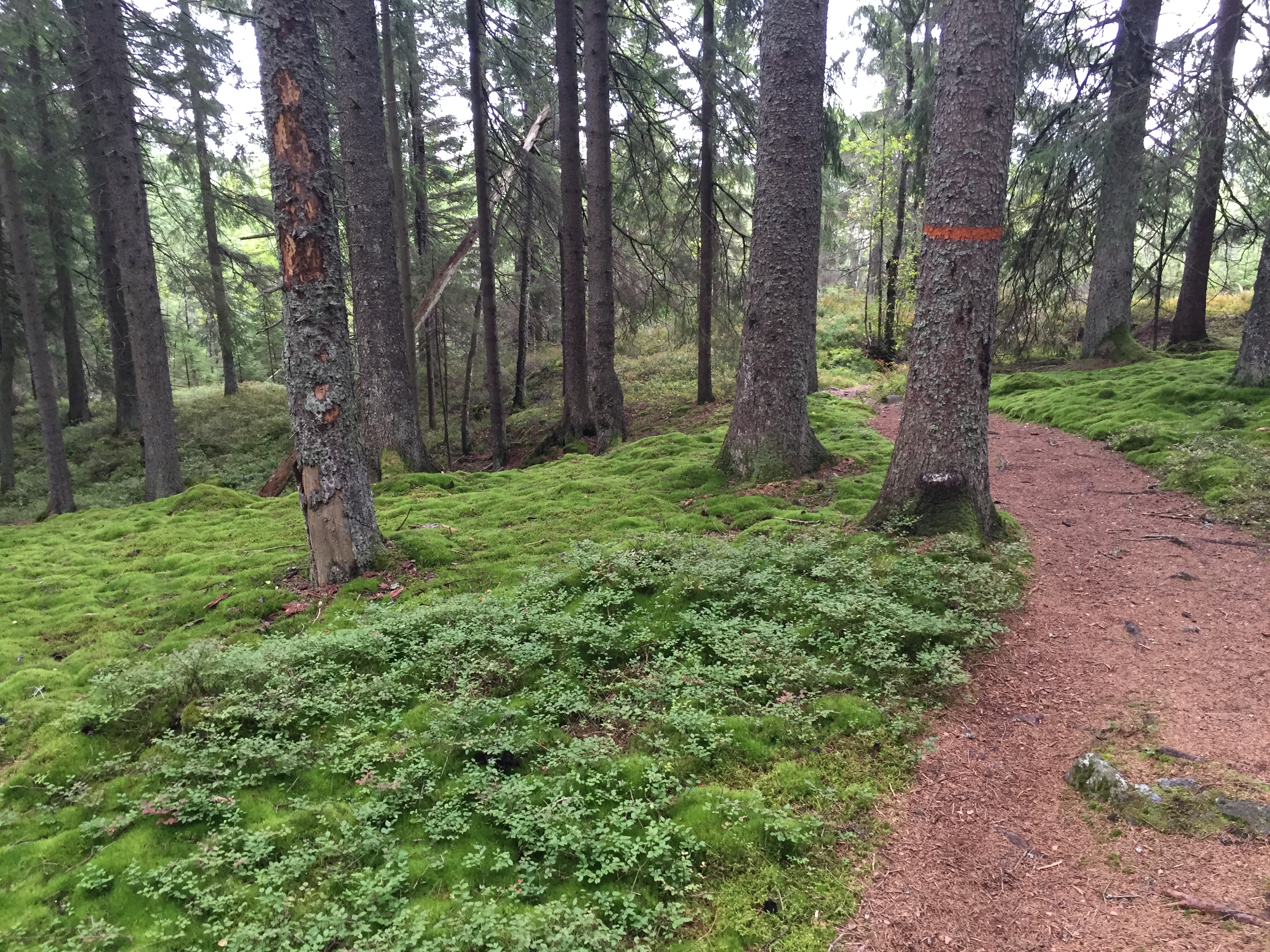 Så här vacker är det att gå till utsikten.